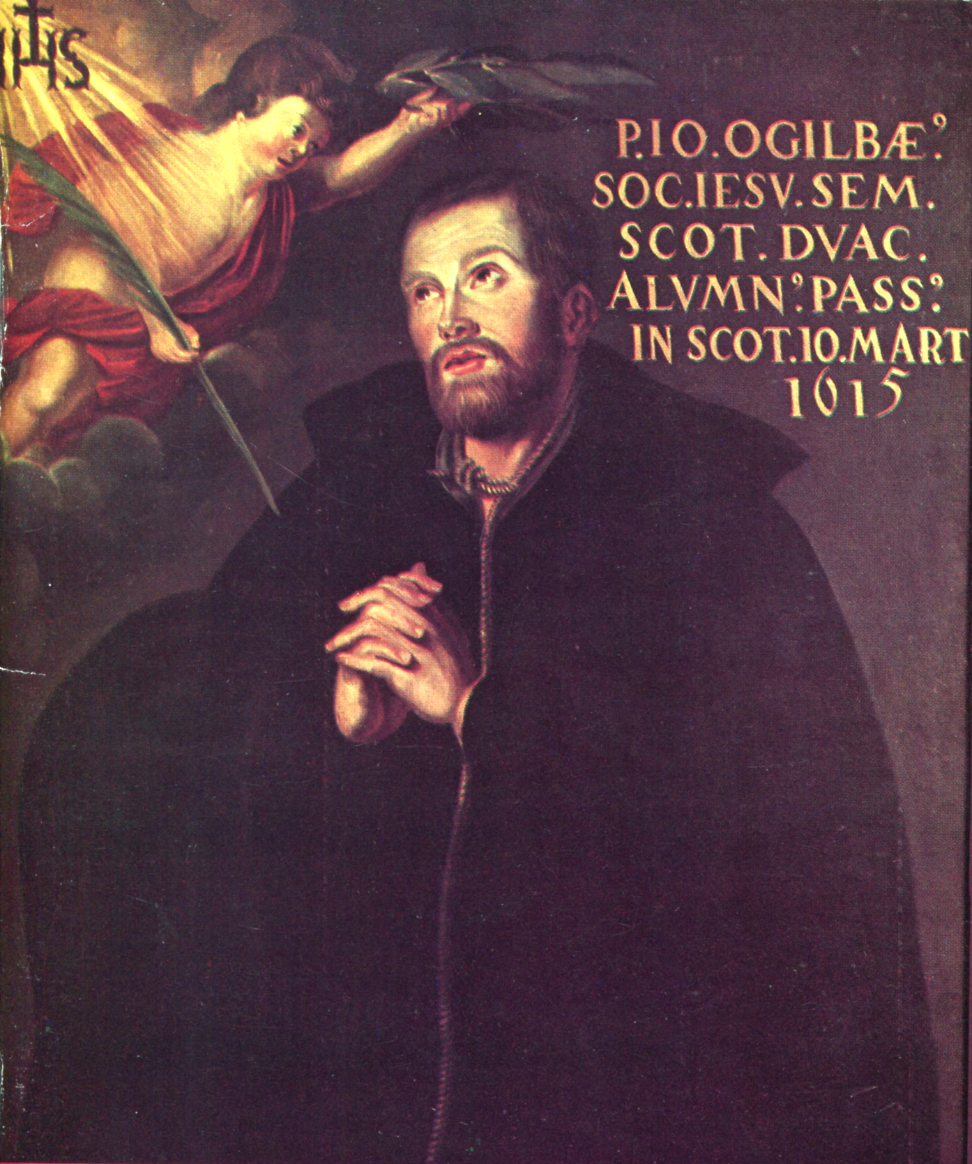 John OgilvieImagen de San Juan de Ogilvie Presbítero y Mártir Escoses